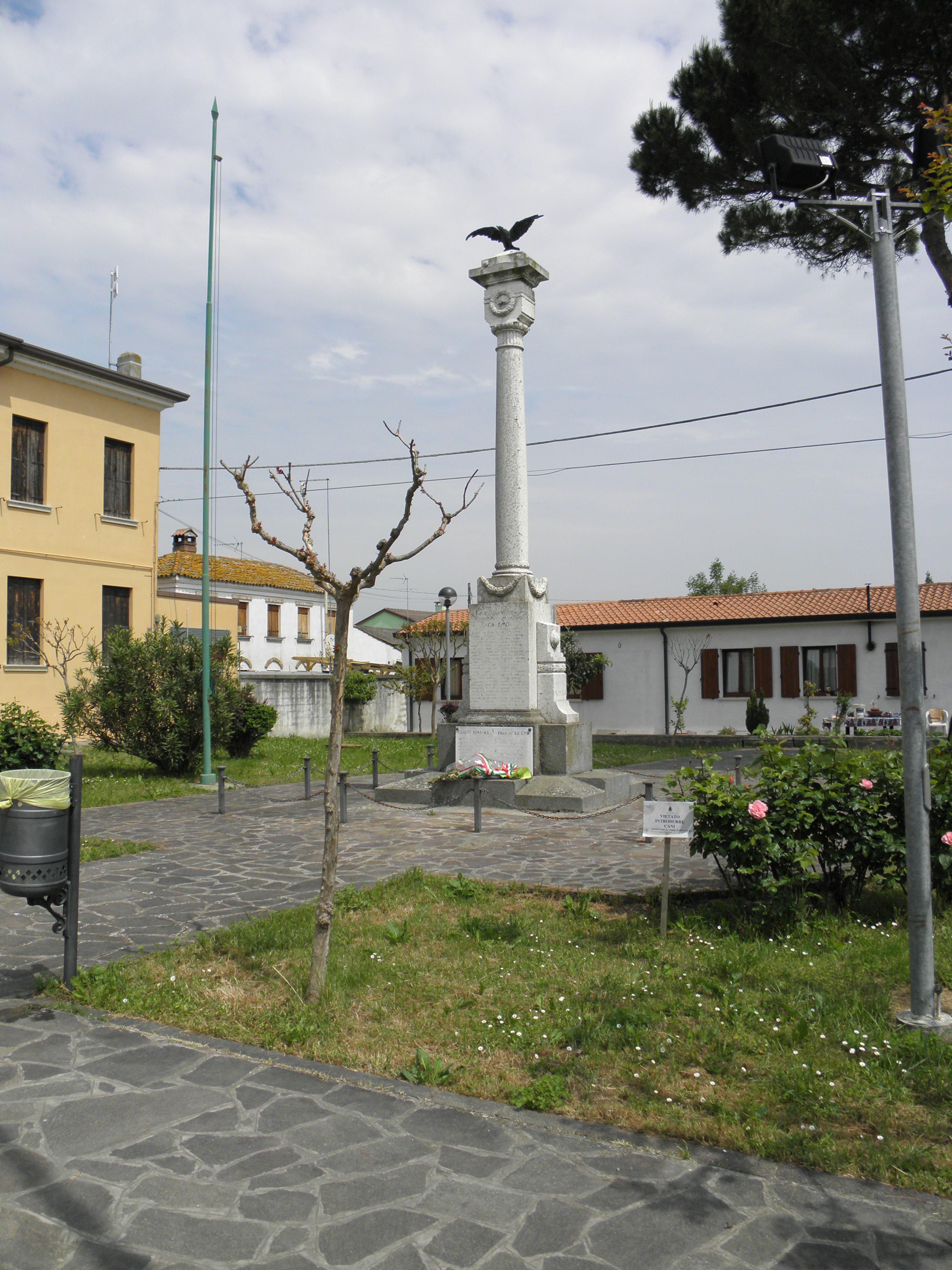 Ca' Emo, frazione di Adria e già comune autonomo: il monumento dedicato ai concittadini caduti nella prima e nella seconda guerra mondiale.